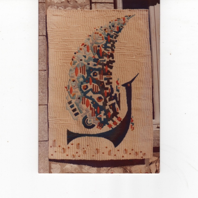 Tapisserie de Pierre Lardin, en laine sur canevas, réalisée en 1975 et exposée dans sa demeure en 1976.